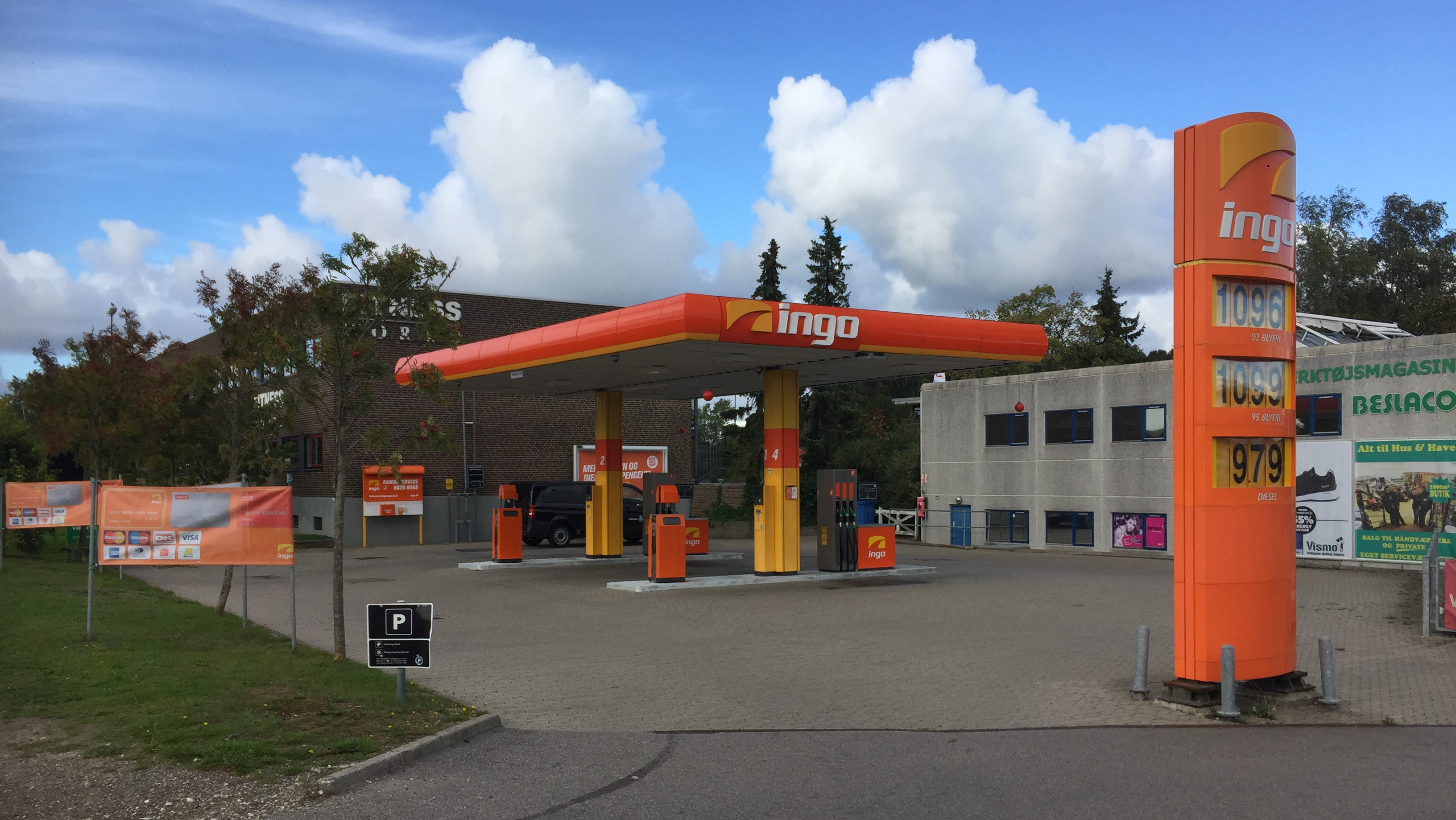 Ingo Kongevejen 62B, 3460 Birkerød